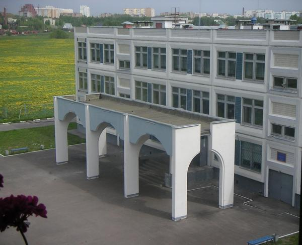 Вид из окна кабинета химии на школу № 6 города Железнодорожного